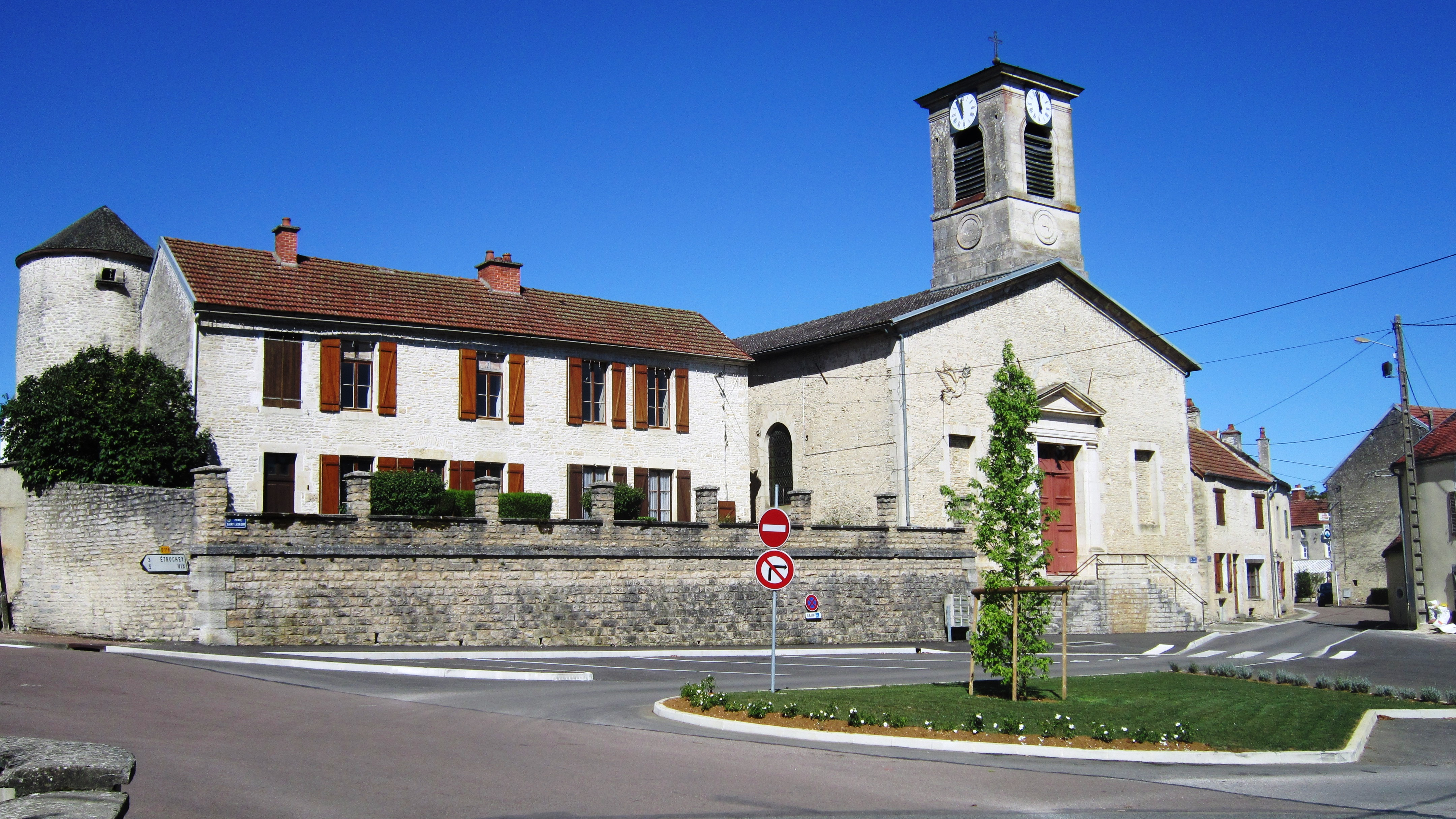 Eglise de Sainte-Colombe-sur-Seine